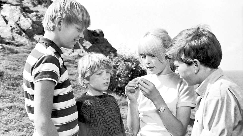 Fotografiets bildtext i När-Var-Hur 1969 (utg. 1968), s. 332: "I Folke Mellvigs "Kullamannen" spelade fr.v. Olle Myrberg, Staffan Hallerstam, Maria Lindberg och Håkan Waldebrandt."